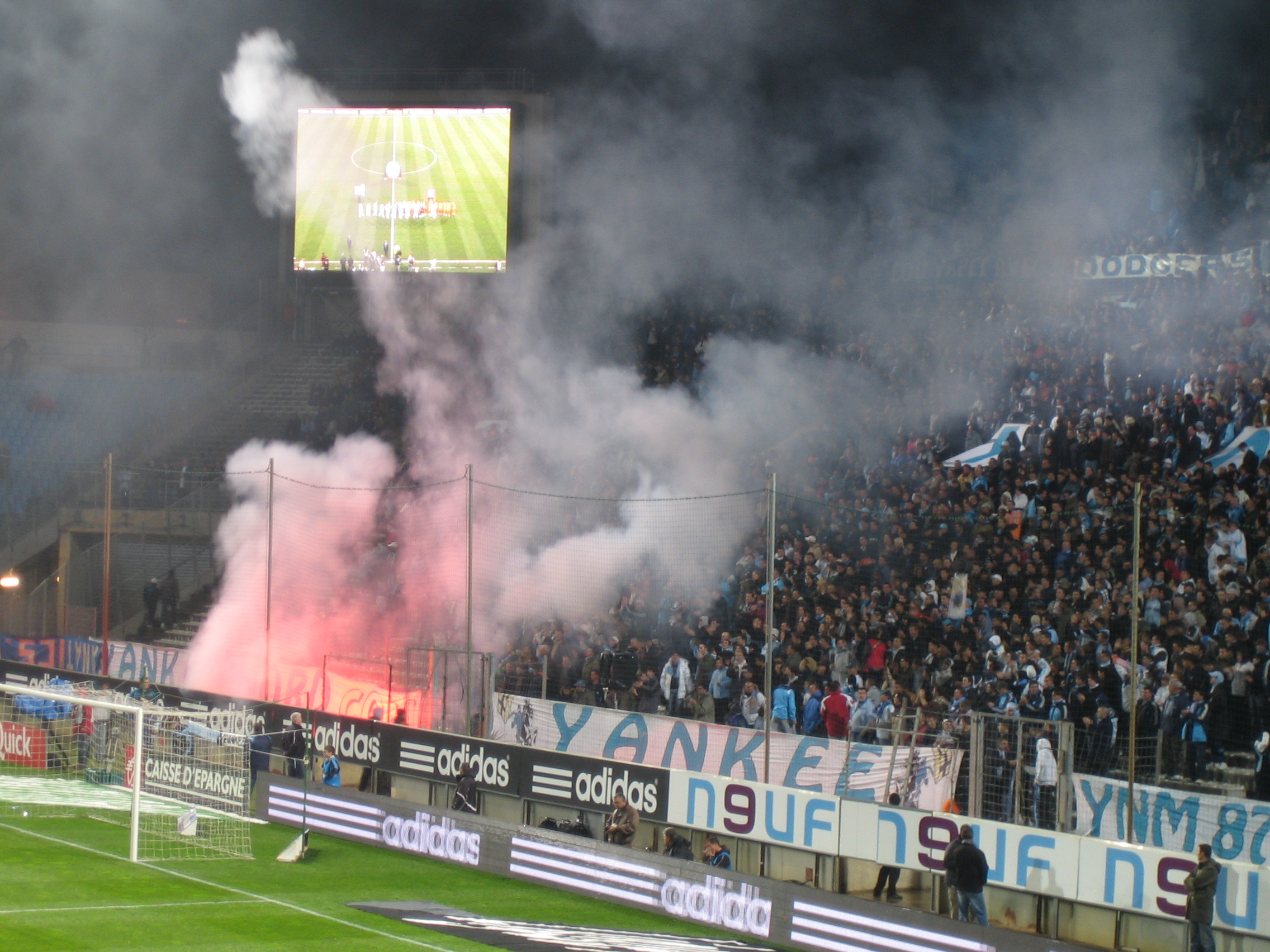 Virage Nord avant-match OM-Metz 2007